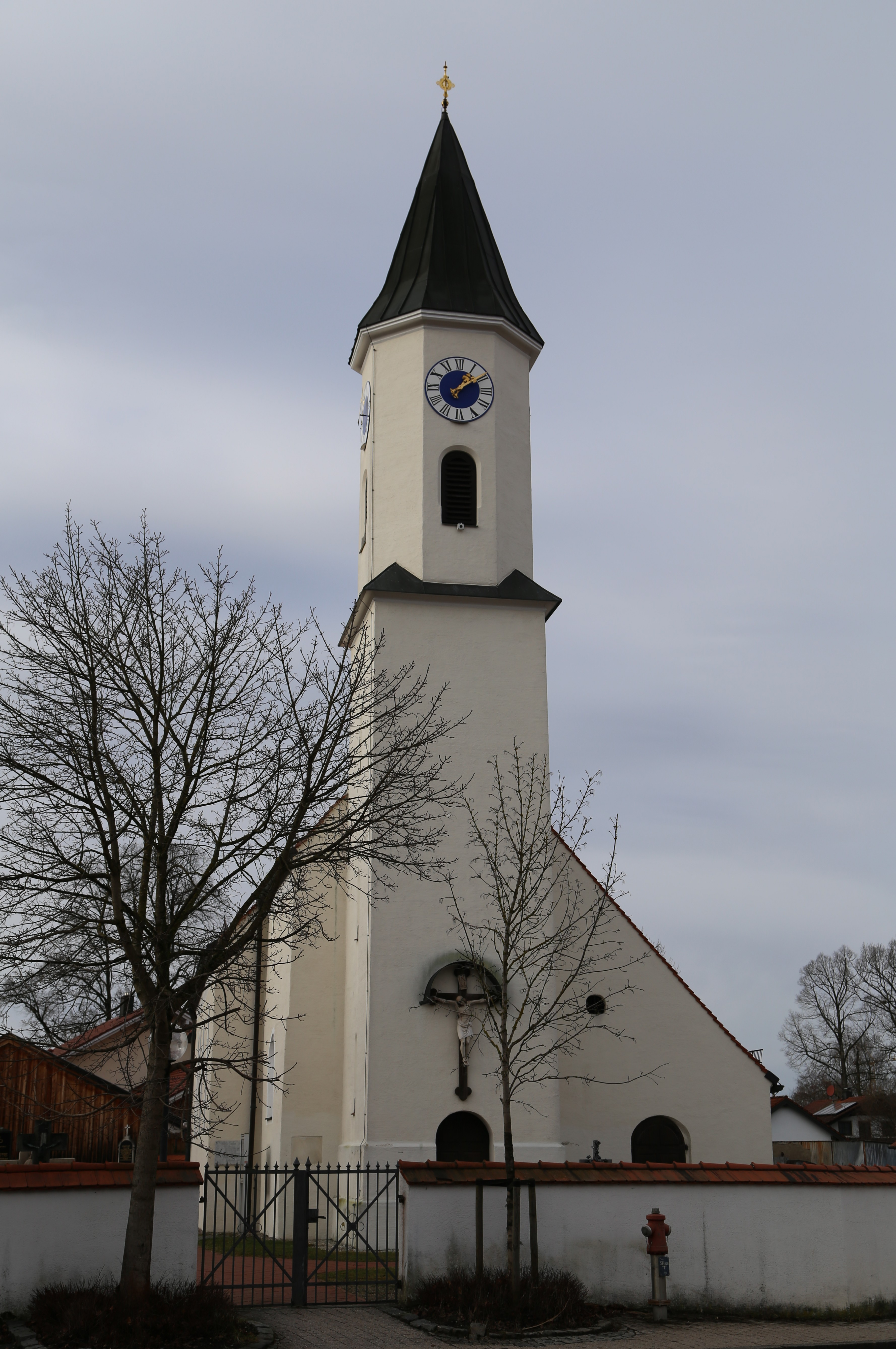 Kirchenstraße 1; Katholische Filialkirche St. Andreas. Im Kern gotischer Saalbau mit eingezogenem quadratischem Chor, Ostturm mit Spitzhelm und angefügter Sakristei, 14./15. Jahrhundert, Langhaus um 1870 erweitert, Turm barock; mit Ausstattung.